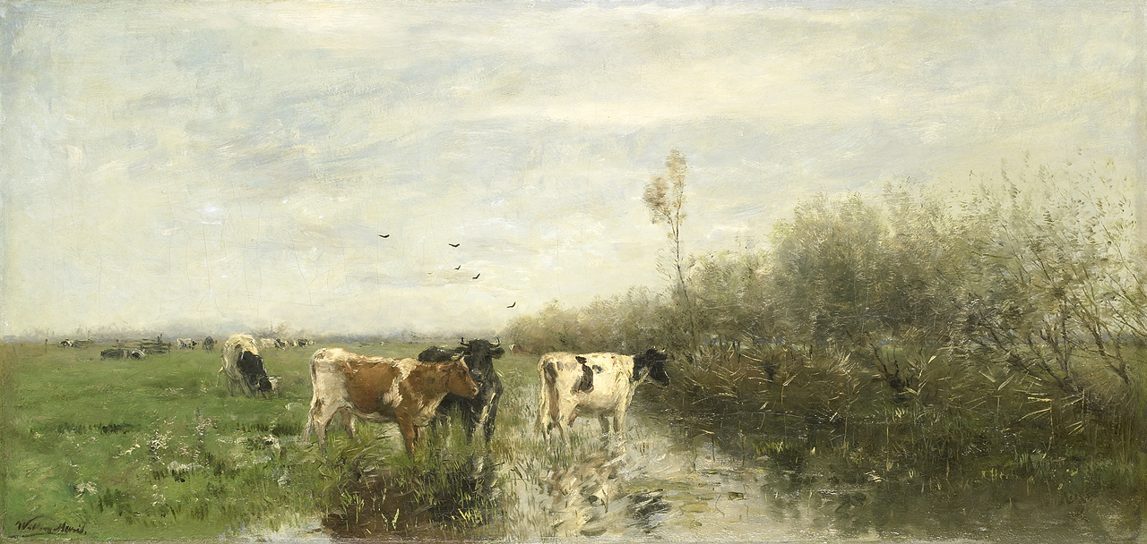 Nedersaksies: Koeien in een drassig weiland